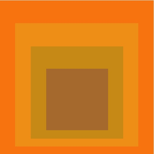 Graphik nach: Josef Albers, Homage to the Square (Huldigung an das Quadrat), 1964, Öl auf Hartfaserplatte (Masonit), 121x121 cm, Josef-Albers-Museum Bottrop.